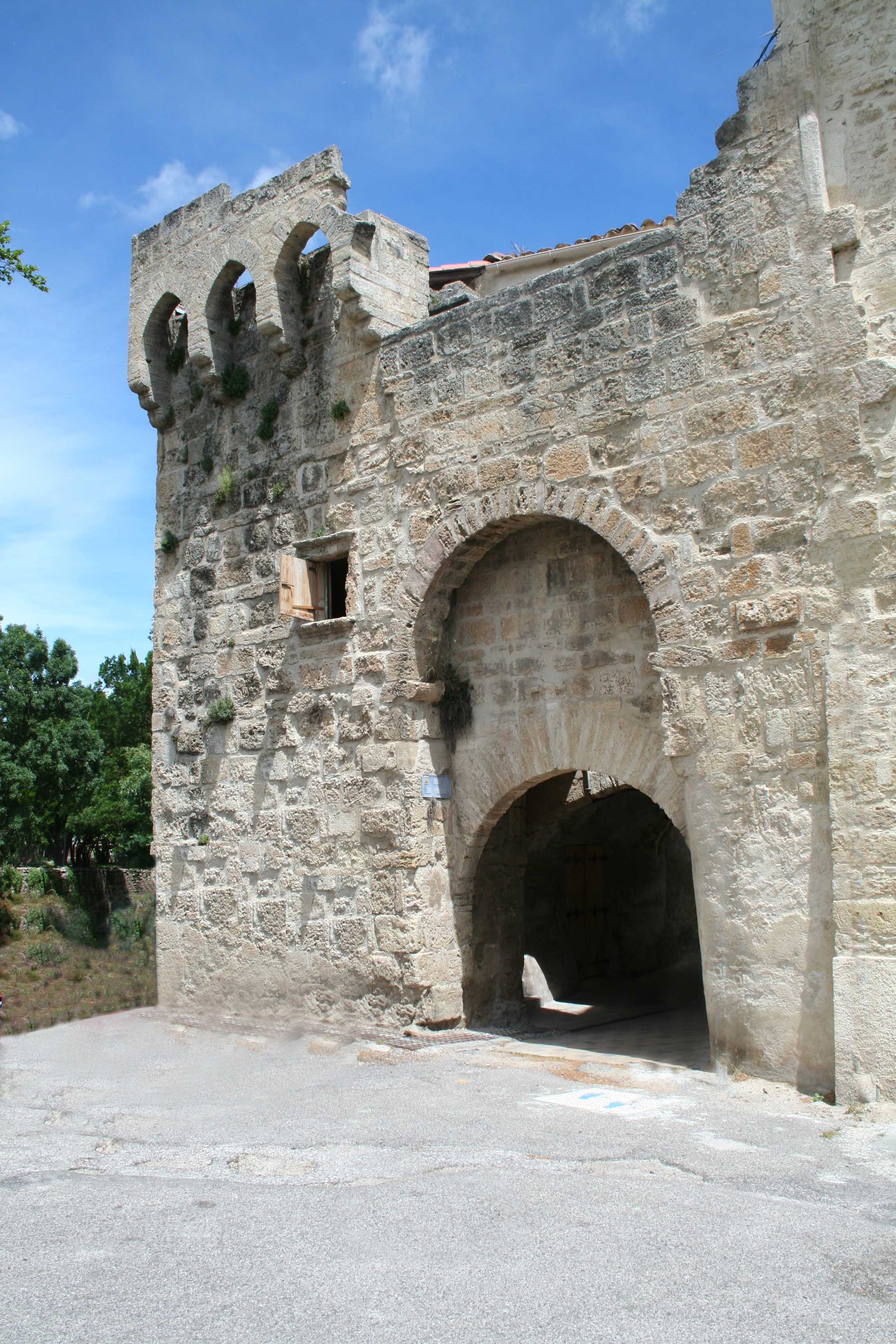 Montbazin (Hérault) - Porte de l'enceinte, de style gothique.